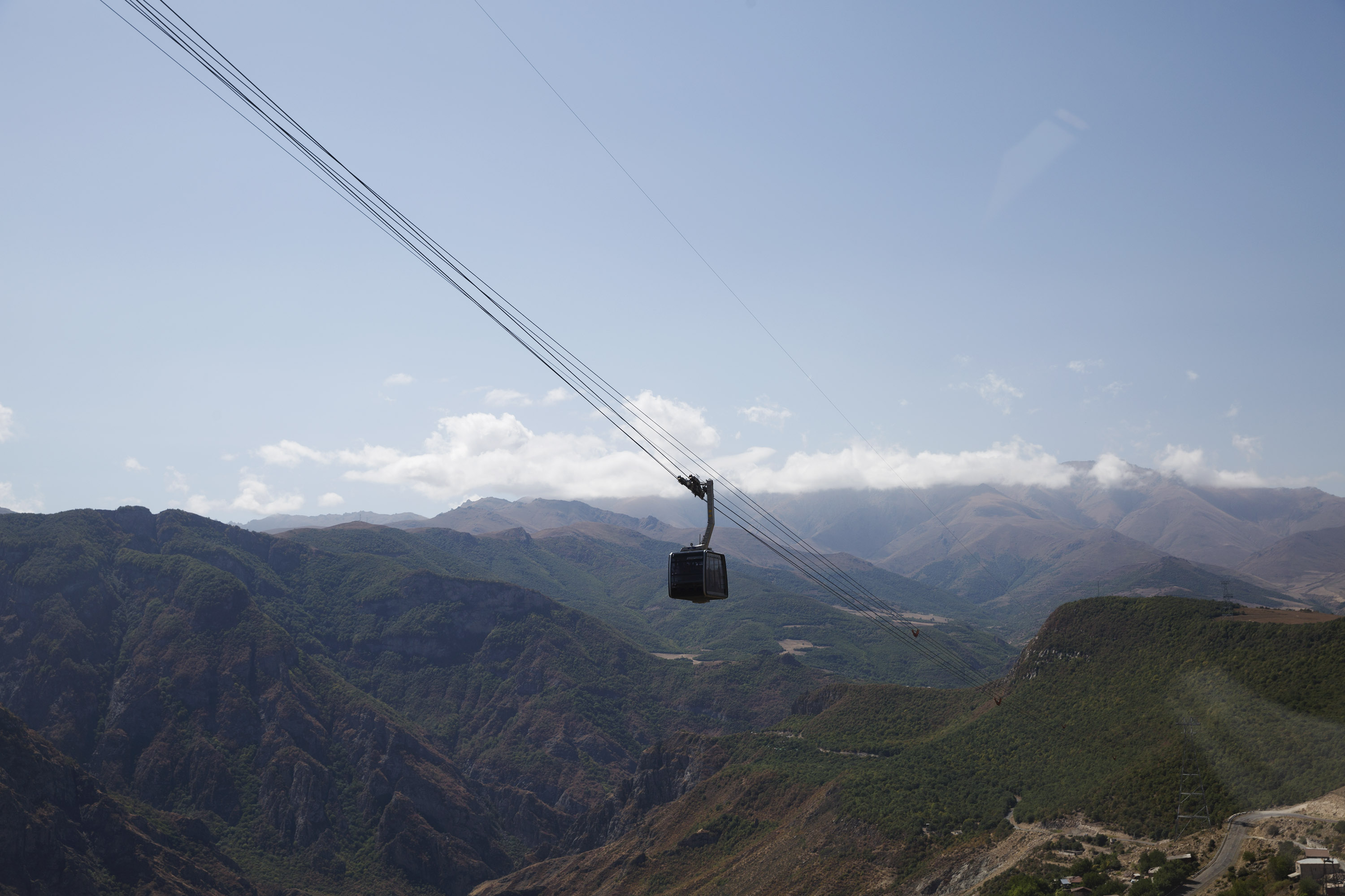 Канатная дорога Крылья Татева